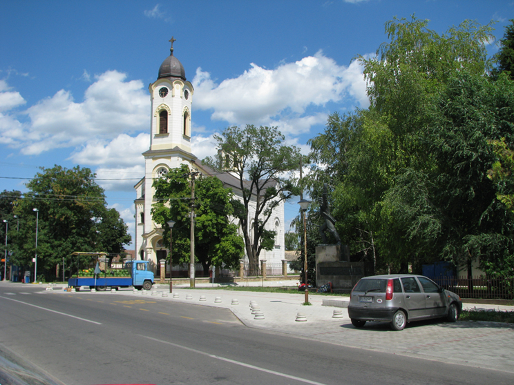 Belegiš